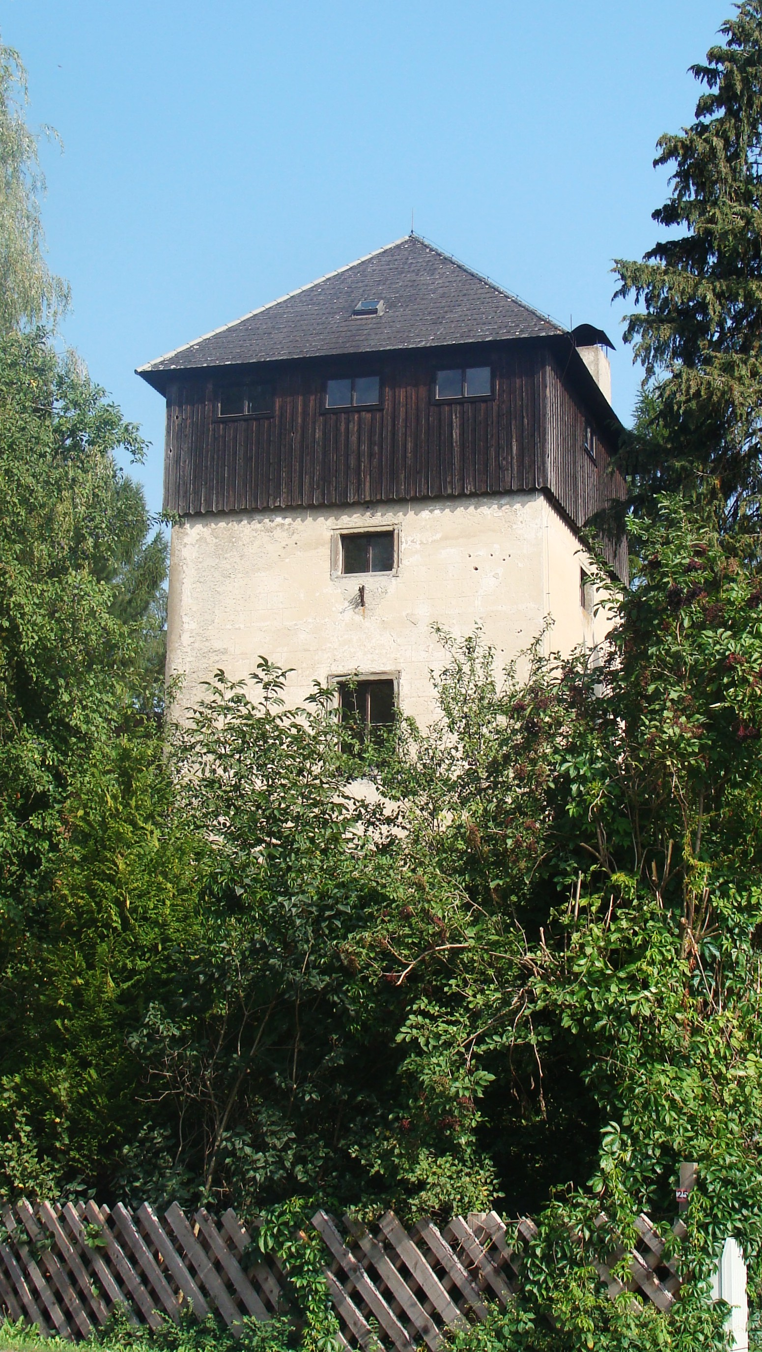 Turm des Schlosses Freidegg